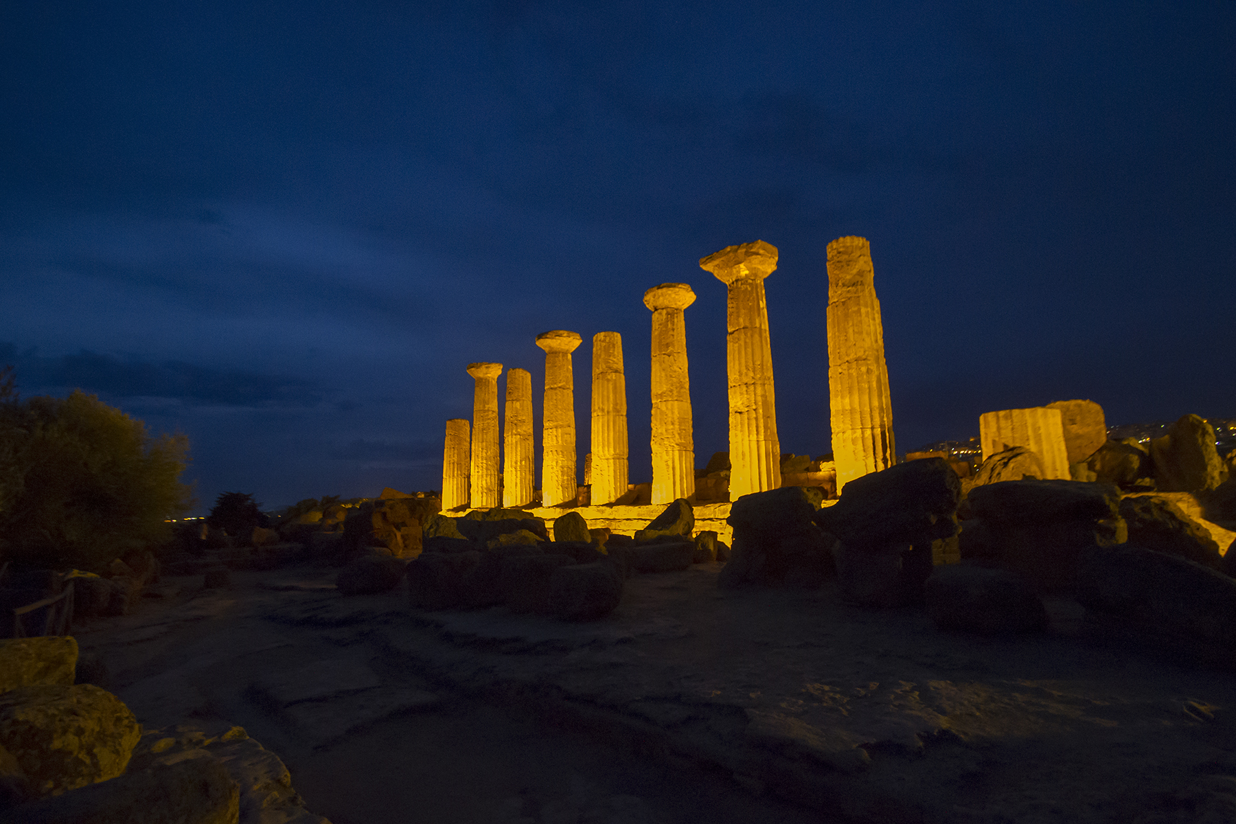 Valle dei Templi 3236